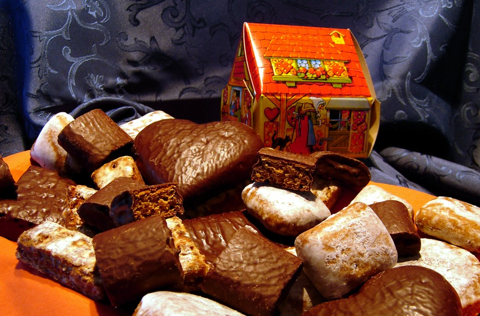 Pulsnitzer Vielfalt an Pfefferkuchen